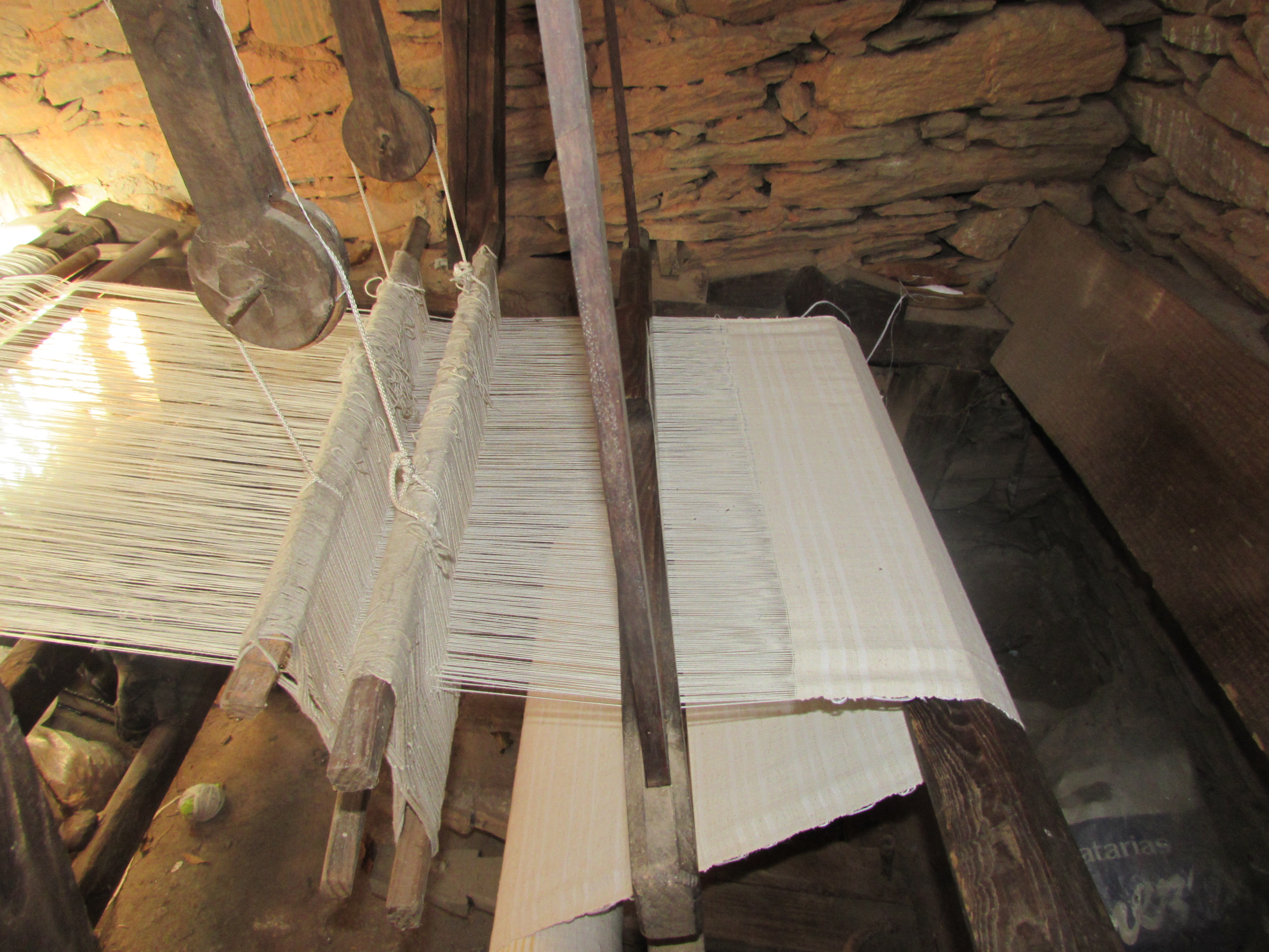 A tecelagem é uma arte que se praticava localmente.